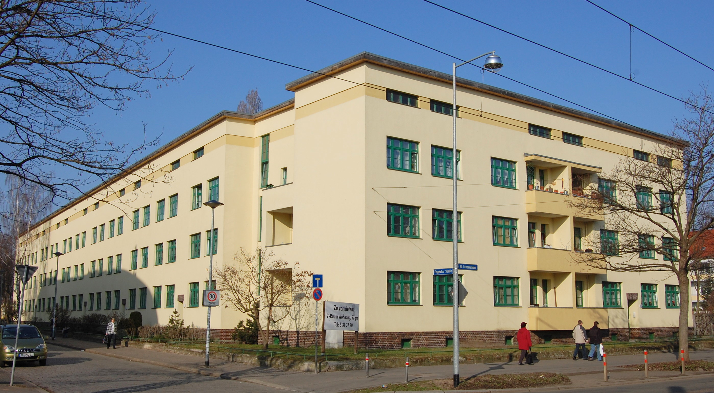 Siedlung Fermersleben, von Crayl gebautes Haus